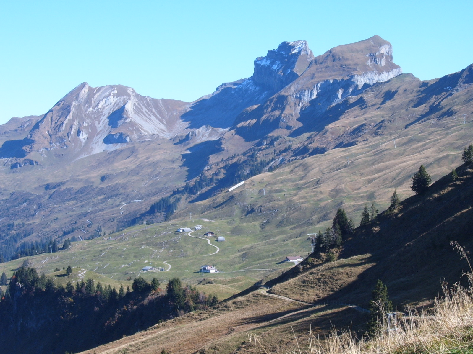 Twäriberg, Druesberg and Forstberg (from left to right), Hoch-Ybrig, Canton of Schwyz, Switzerland Photographer: Markus Bernet Date: 10/16/2005